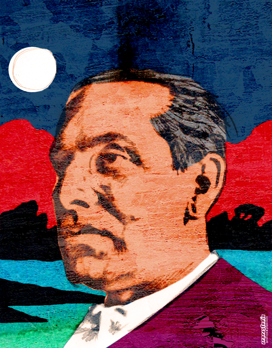 Représentation de Julius Evola probablement inspirée d’une photo de 1940 (ou similaire de la même époque)